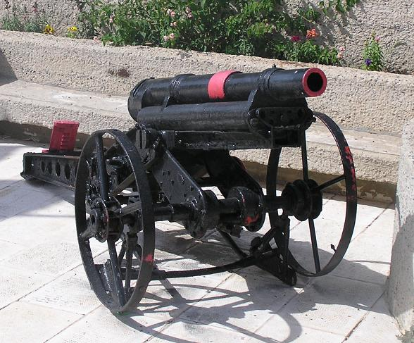 תותח "נפוליאונצ'יק" בקוטר 65 מ"מ. צולם ביד לתותחן בזכרון יעקב.